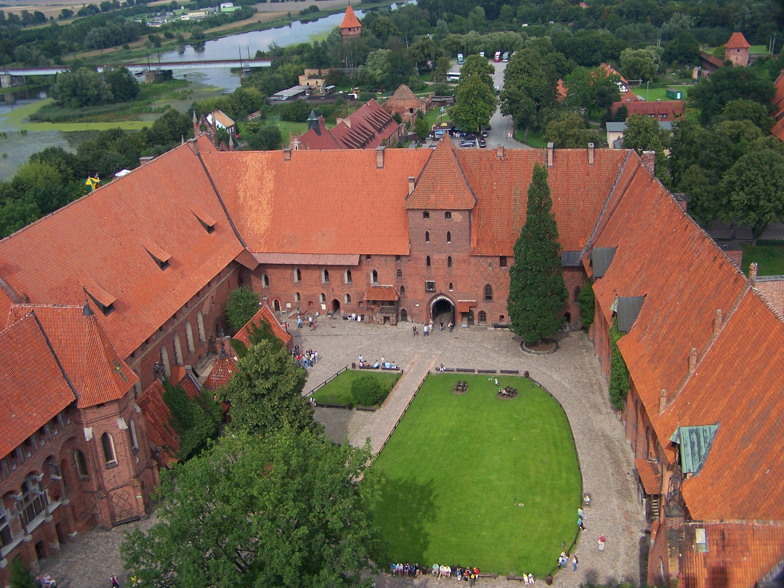 Dziedziniec zamku średniego w Malborku. Widok z wieży zamku wysokiego.